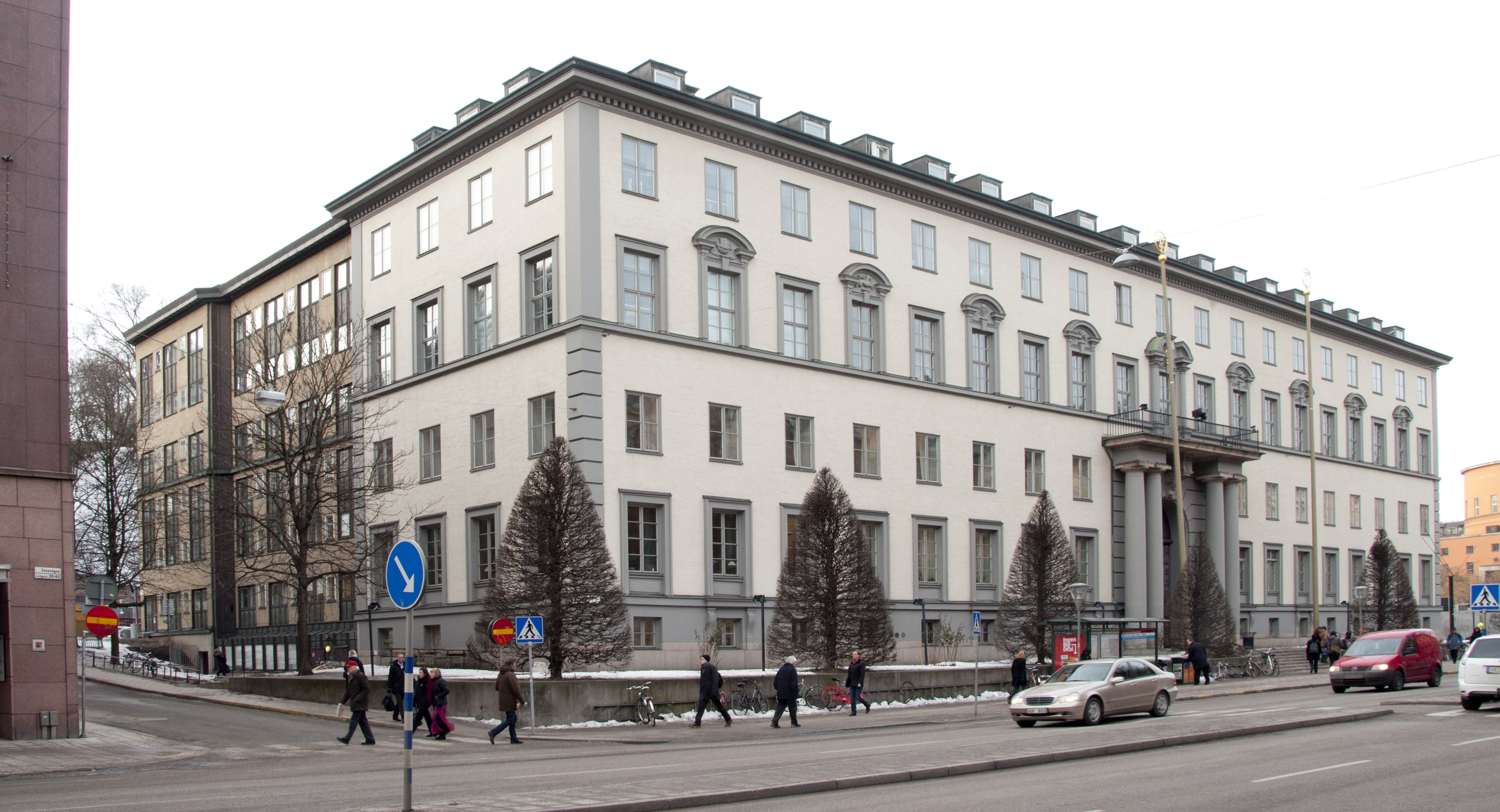 Handelshögskolan. Sveavägen 65, Kungstensgatan 32. Byggnadsår 1925-26, arkitekt Ivar Tengbom, byggherre Handelshögskoleföreningen, byggmästare Hesselman & Bergström. Tillbyggnad 1975 arkitekt Åke Ahlström